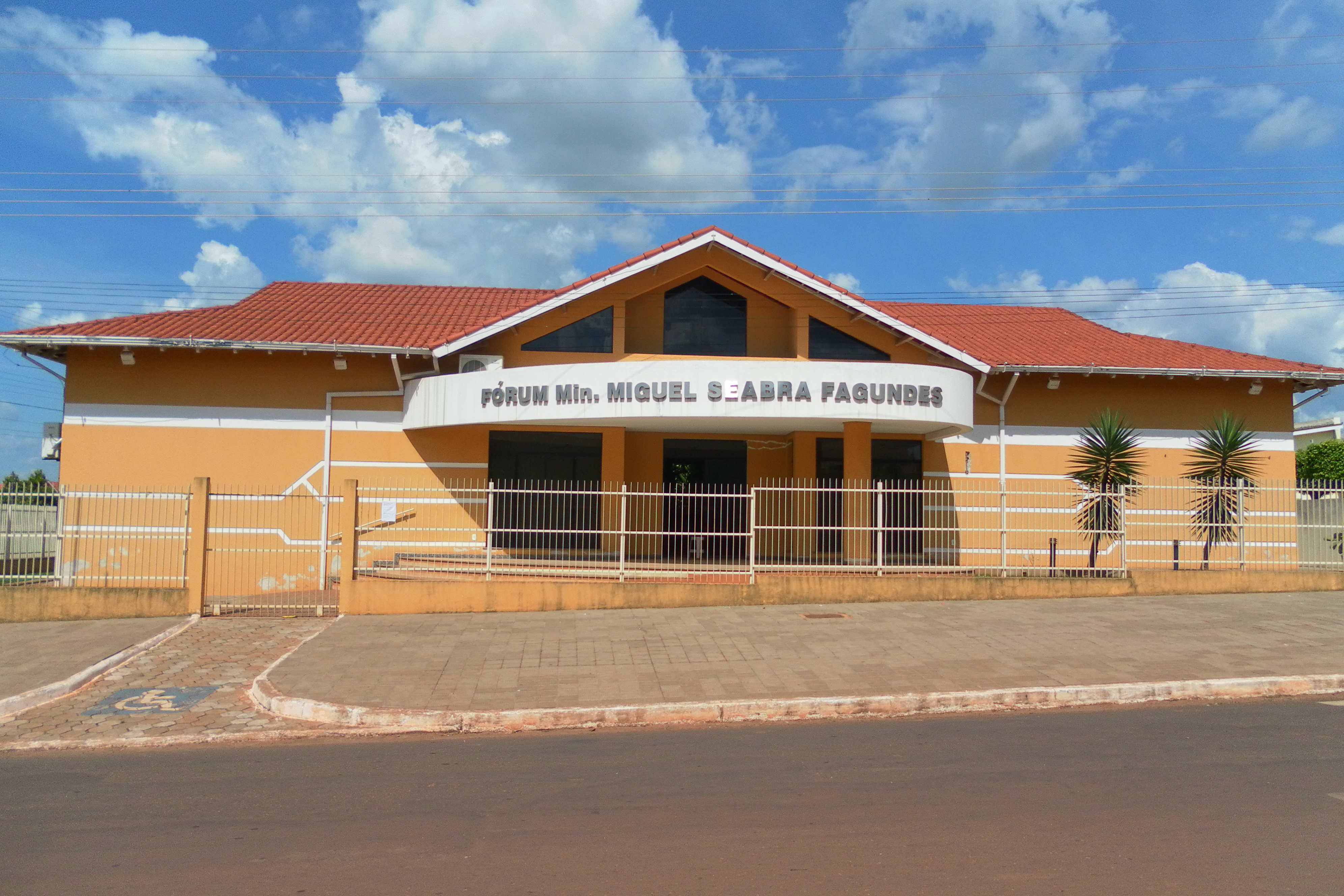 Fórum Ministro Miguel Seabra Fagundes do Município de Espigão do Oeste, Rondônia.